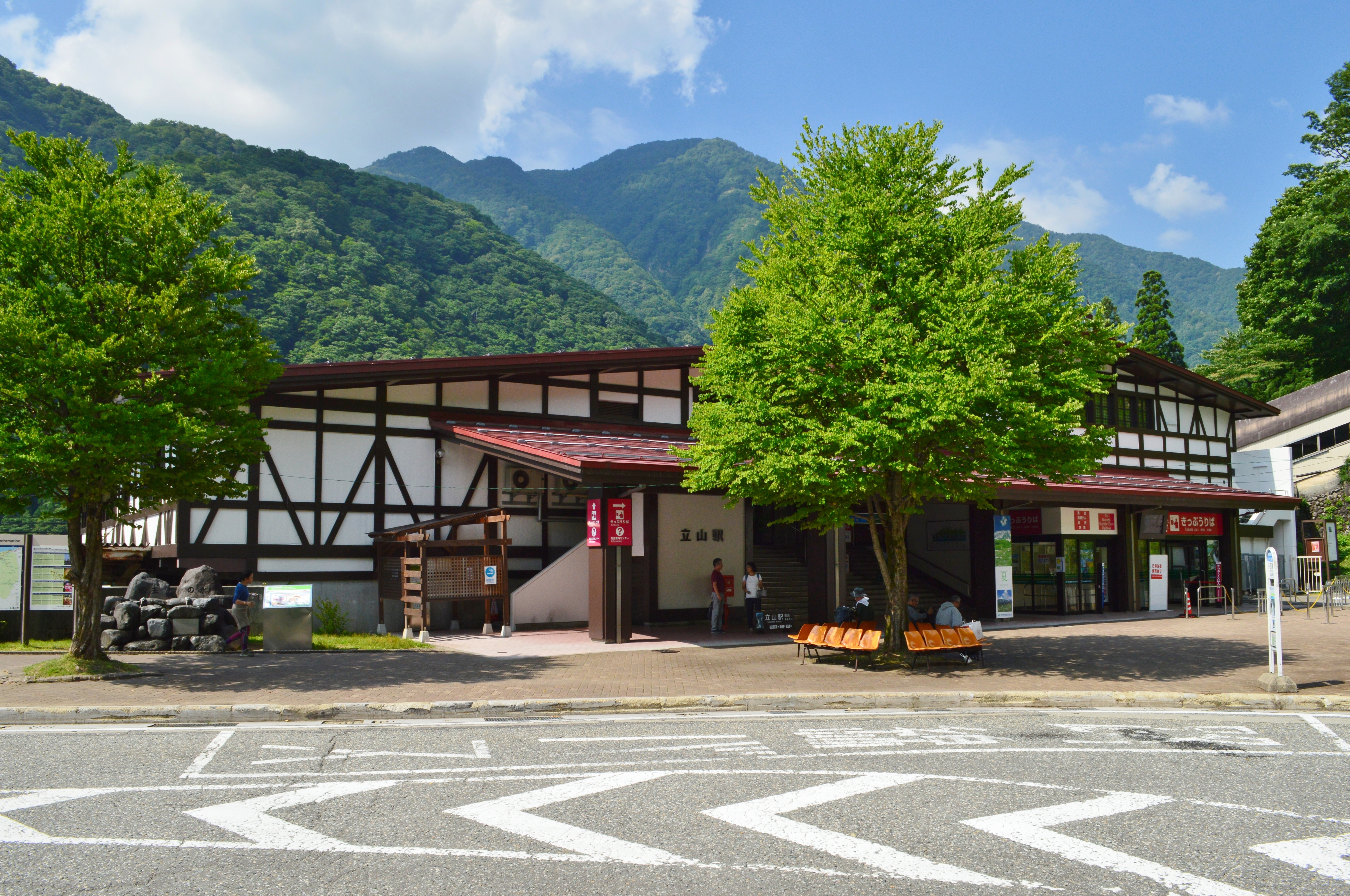 立山駅 駅舎